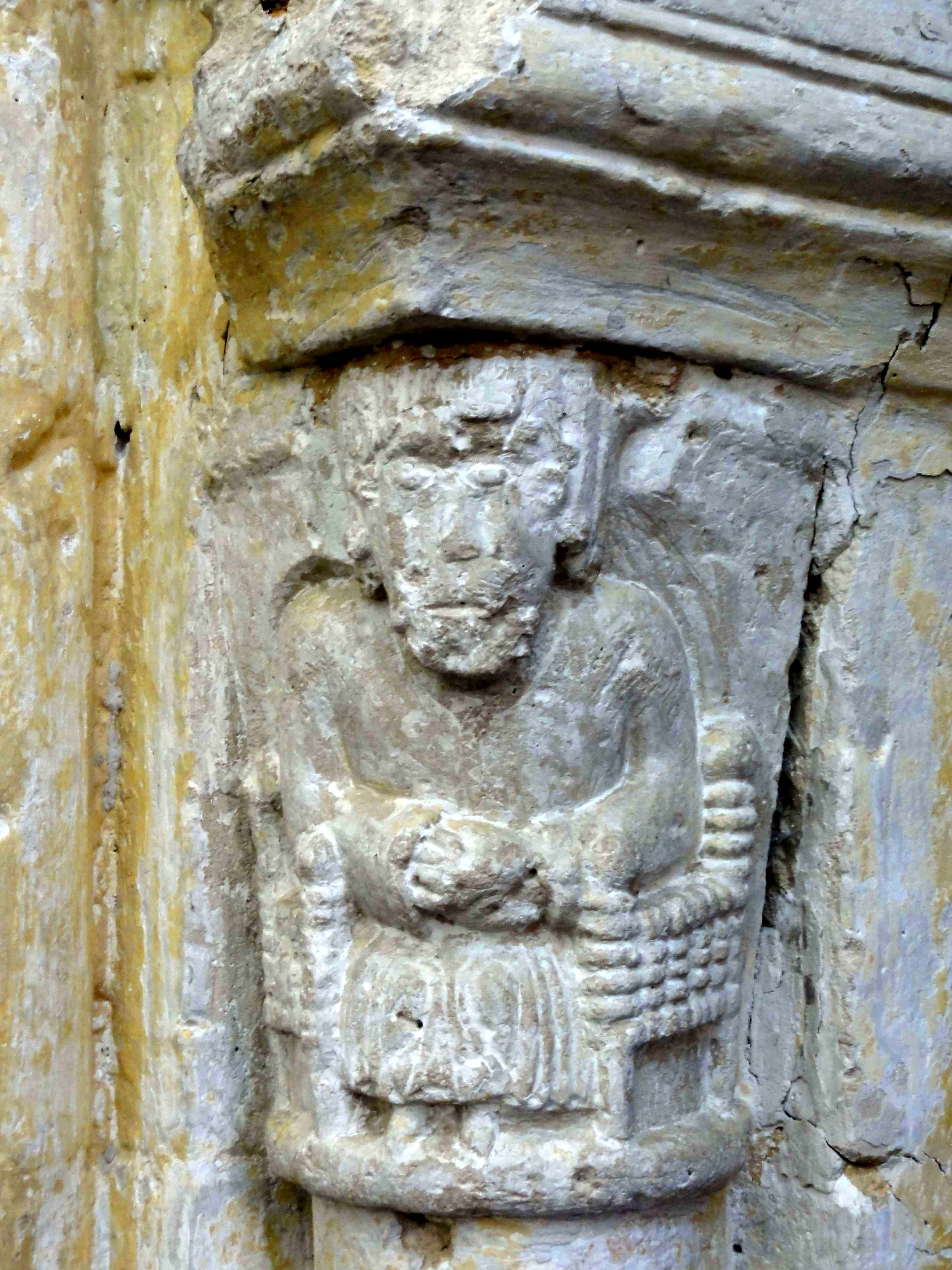 Chapiteau(x) de l'église.